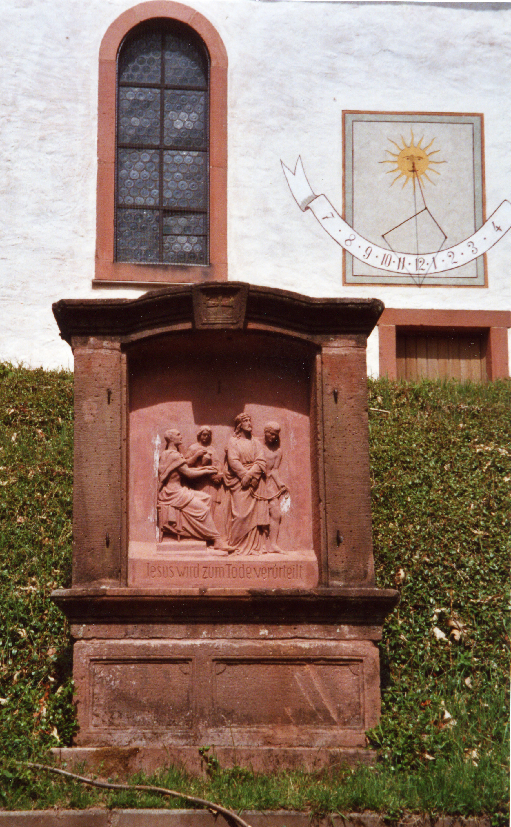 Station I des Kreuzweges an der Kolmerberg-Kapelle bei Dörrenbach; Jesus wird zum Tode verurteilt; rechts im Sockel bezeichnet AUFGERI/CHTET / MARTIN / SCHAFF / 1843; im Hintergrund die Kapelle